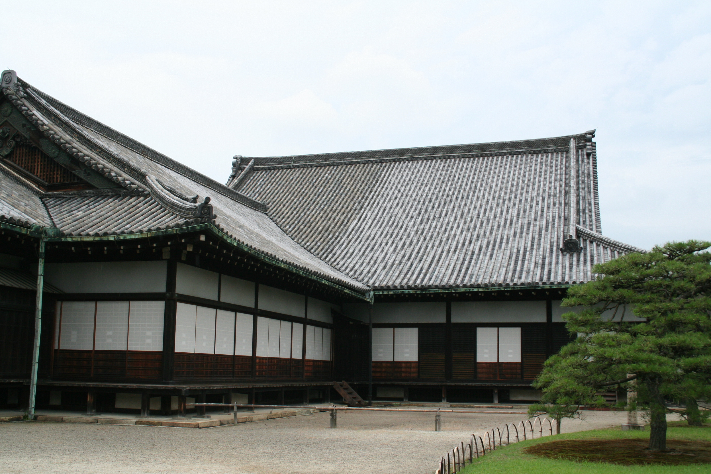 二条城。 二の丸御殿。遠侍(奥)と式台(手前)。